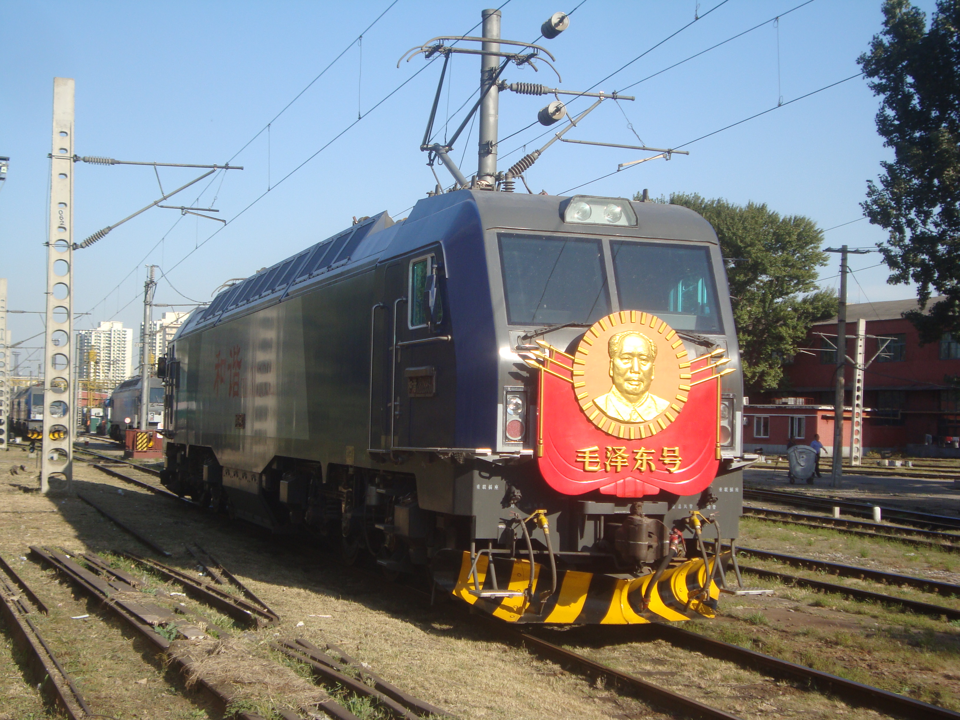 第五代毛泽东号机车（HXD3B-1893）在丰台机务段